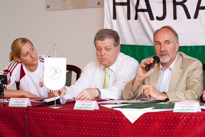 Pálinger Katalin kézilabdázó (balra), Vanyus Attila sportvezető (középen) és Solti László állatorvos, akadémikus (jobbra).